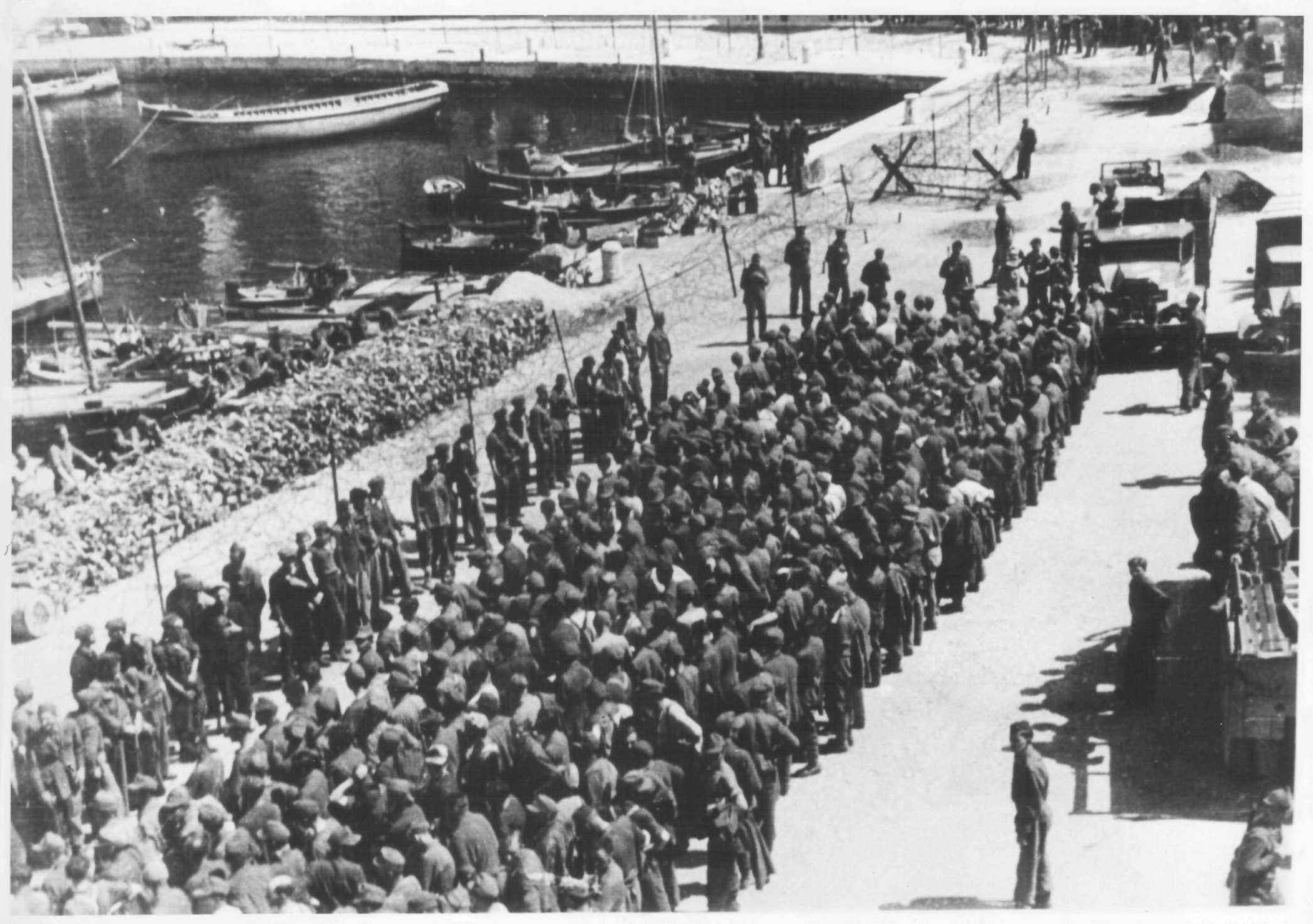 Srpskohrvatski / српскохрватски: Nemački zarobljenici sa Mljeta i Korčule spremaju se za deportaciju u zarobljenički logor na otoku Biševu kod Visa, april 1944.